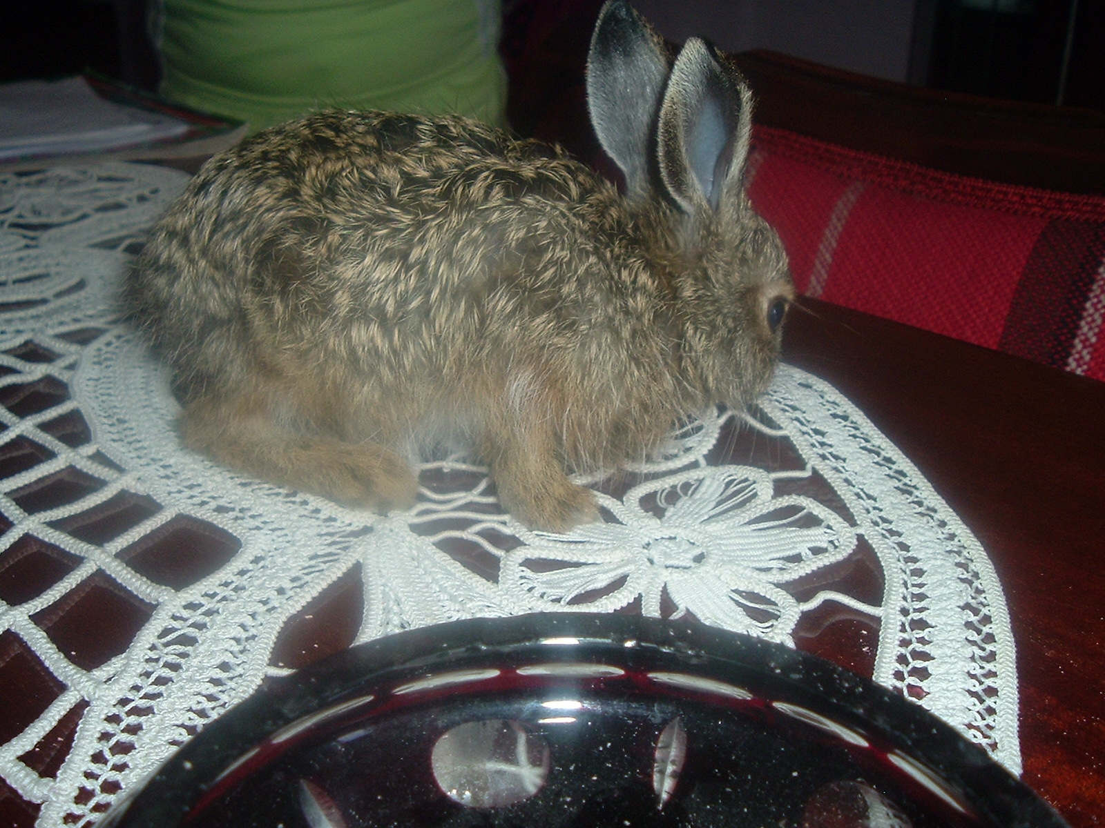 Hare (cub)